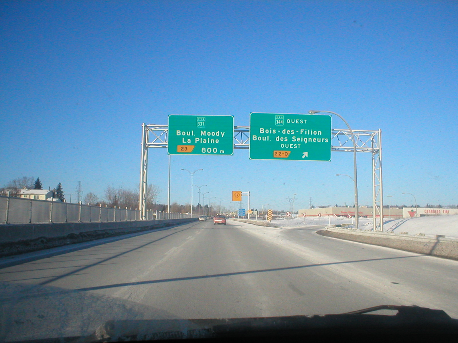 Description: Autoroute québécoise (Autoroute 25 nord près des sorties 22 et 23)